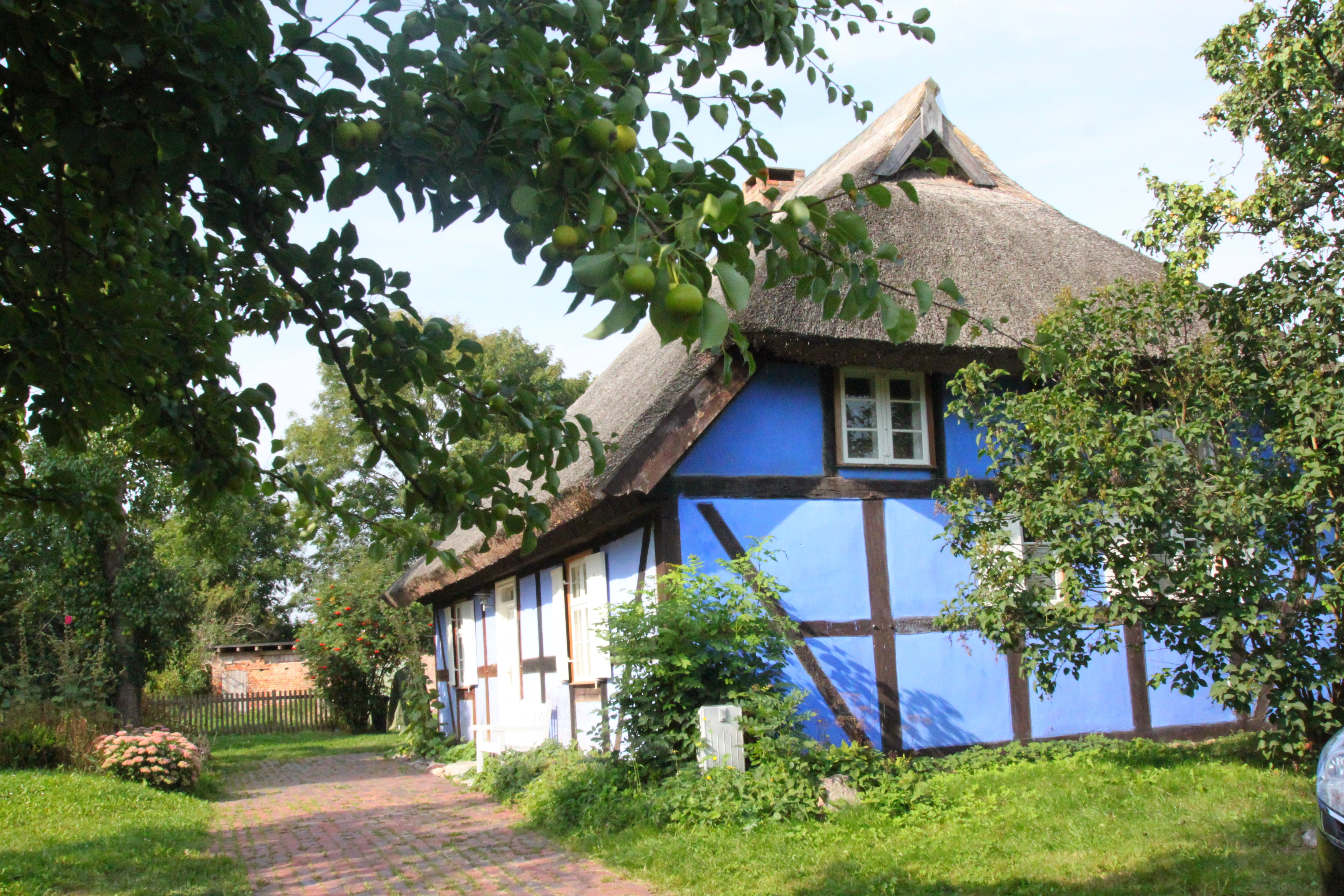 Haus im blauen Farbton mit Schilfrohrdach in Warthe